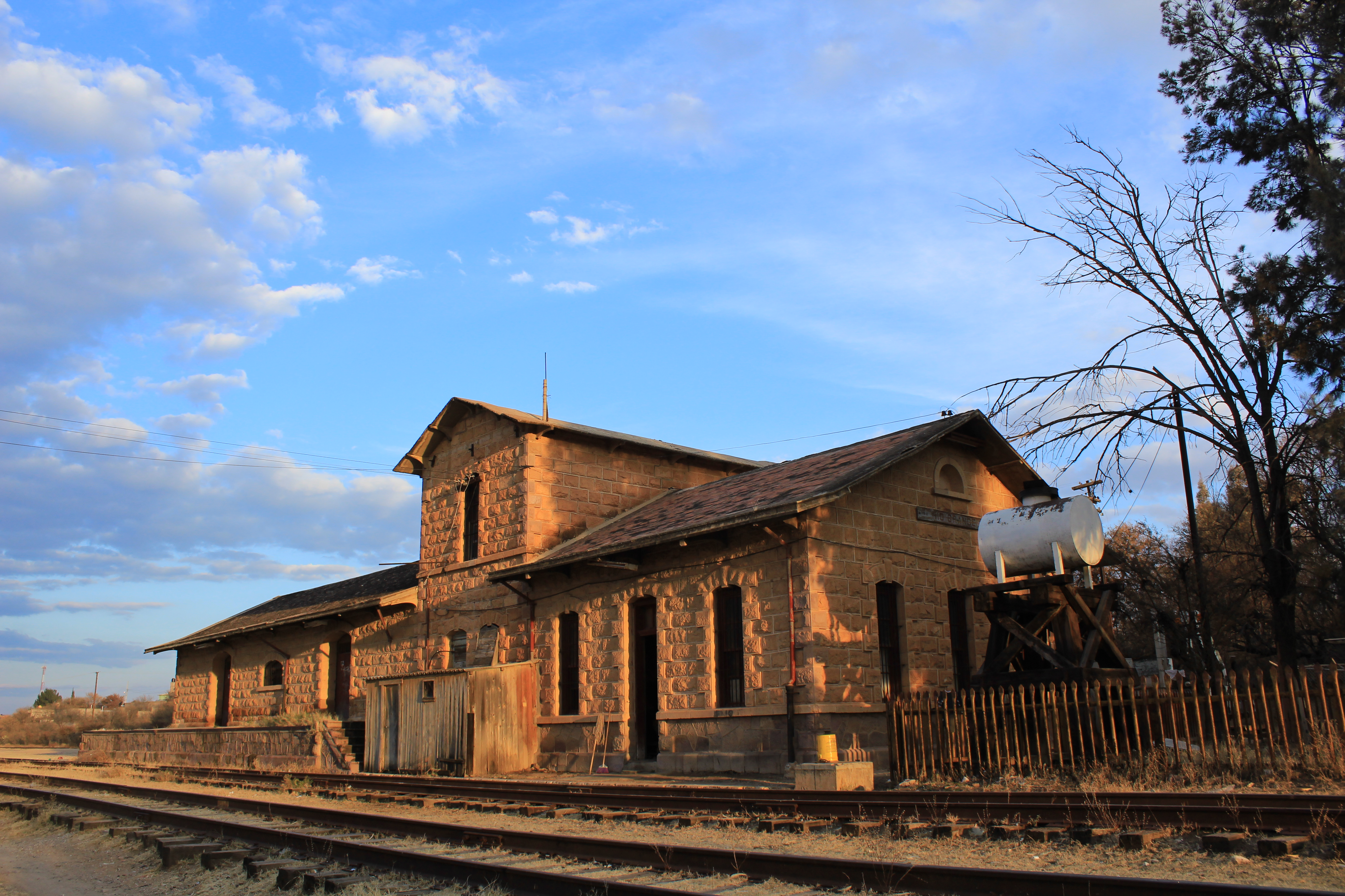 fotografía para la posteridad de la antigua estación del ferrocarril en rio grande, recuerdo histórico del pueblo.